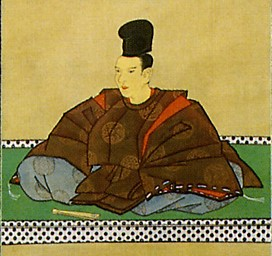 植松雅永の肖像。